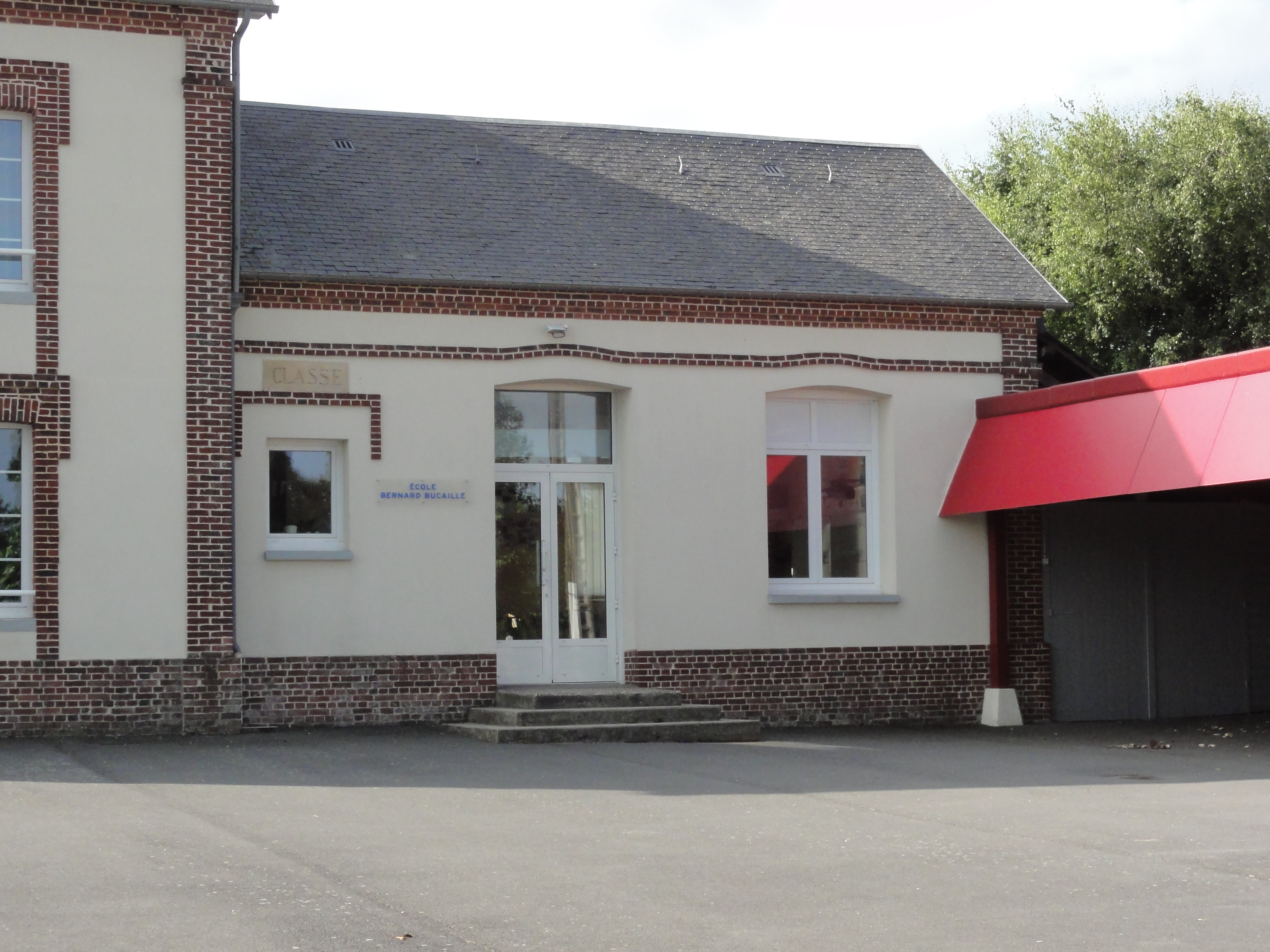 Flamanville (Seine-Mar.) école